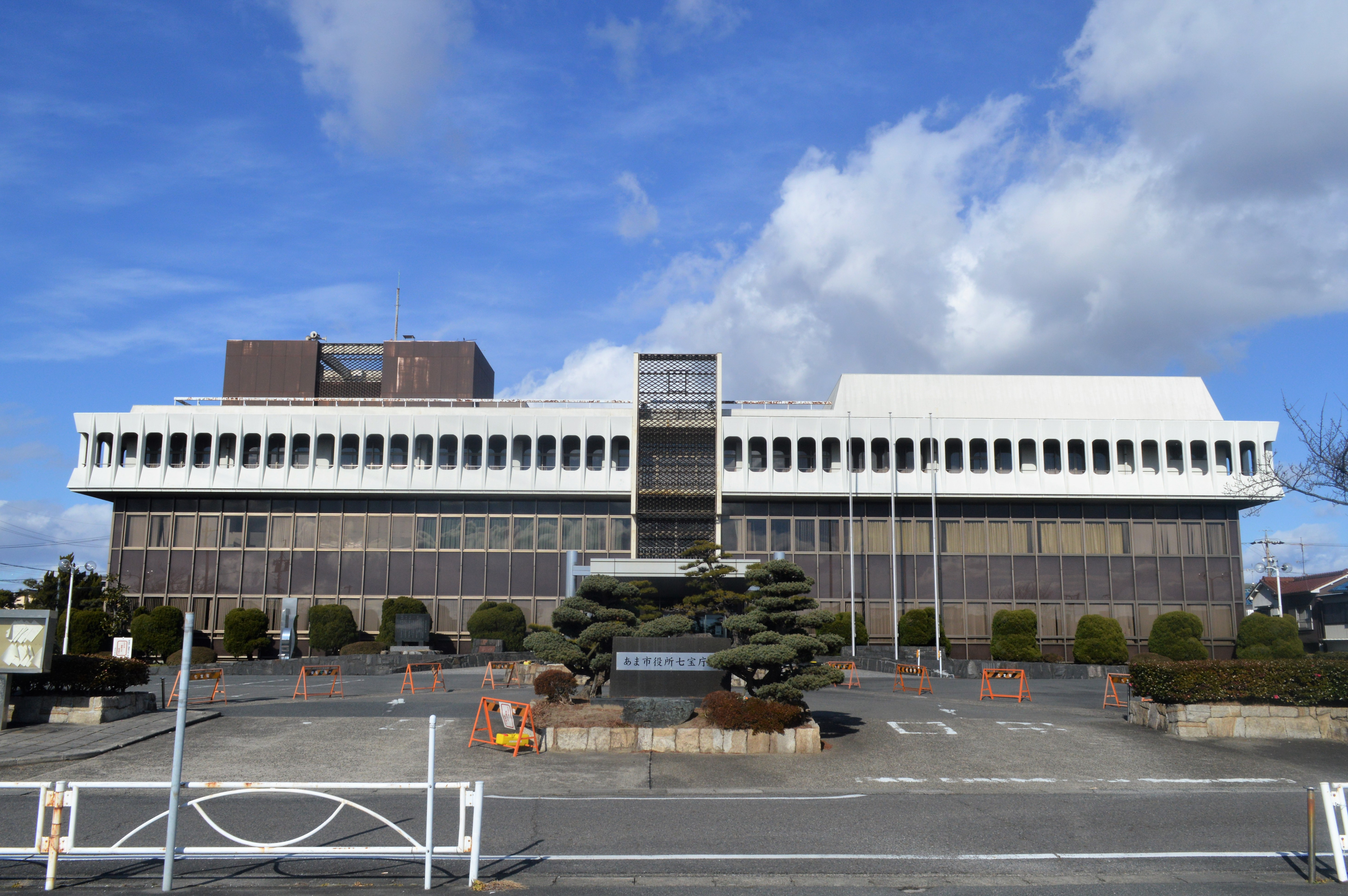 愛知県あま市のあま市役所七宝庁舎。